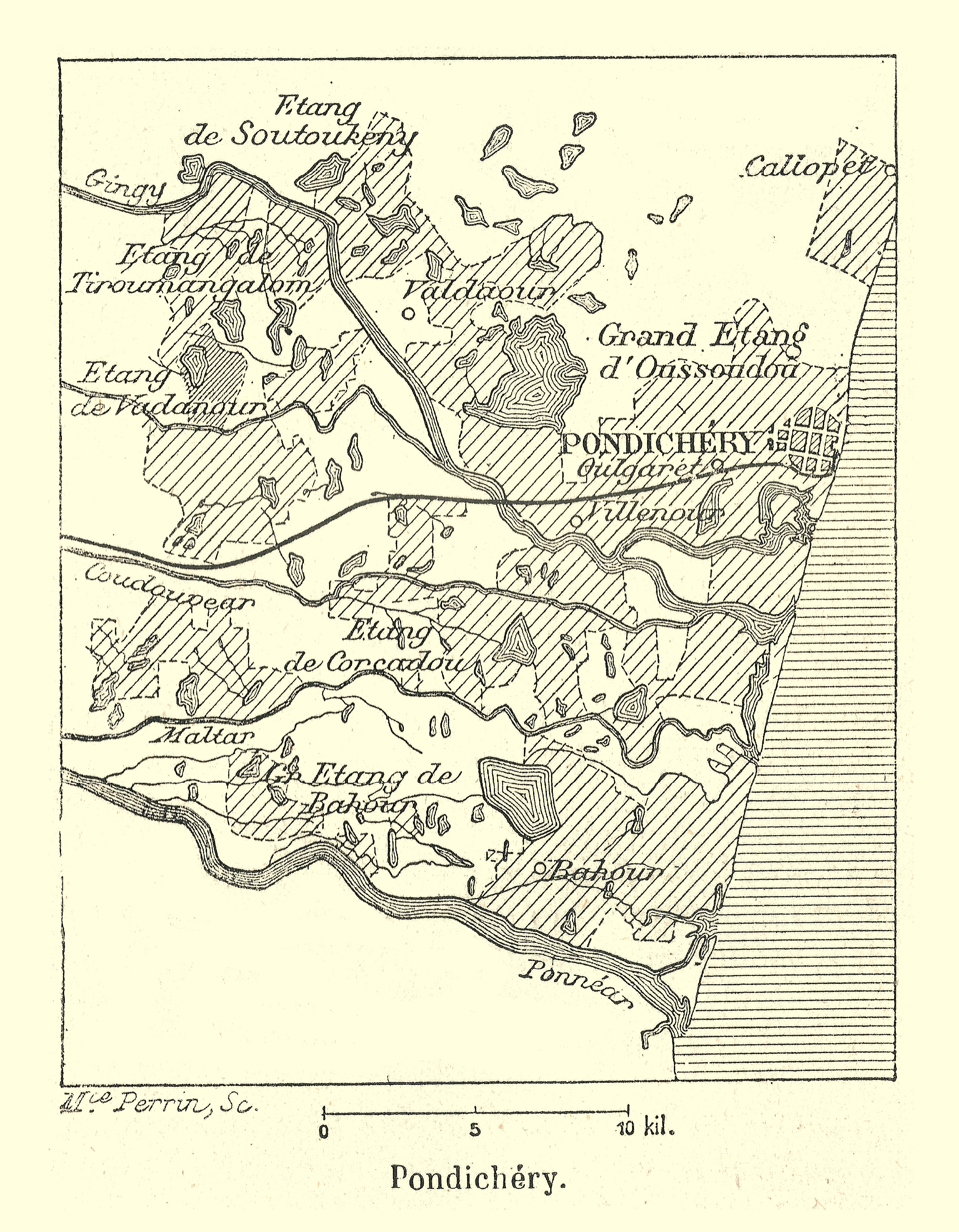 Carte de Franz Schrader